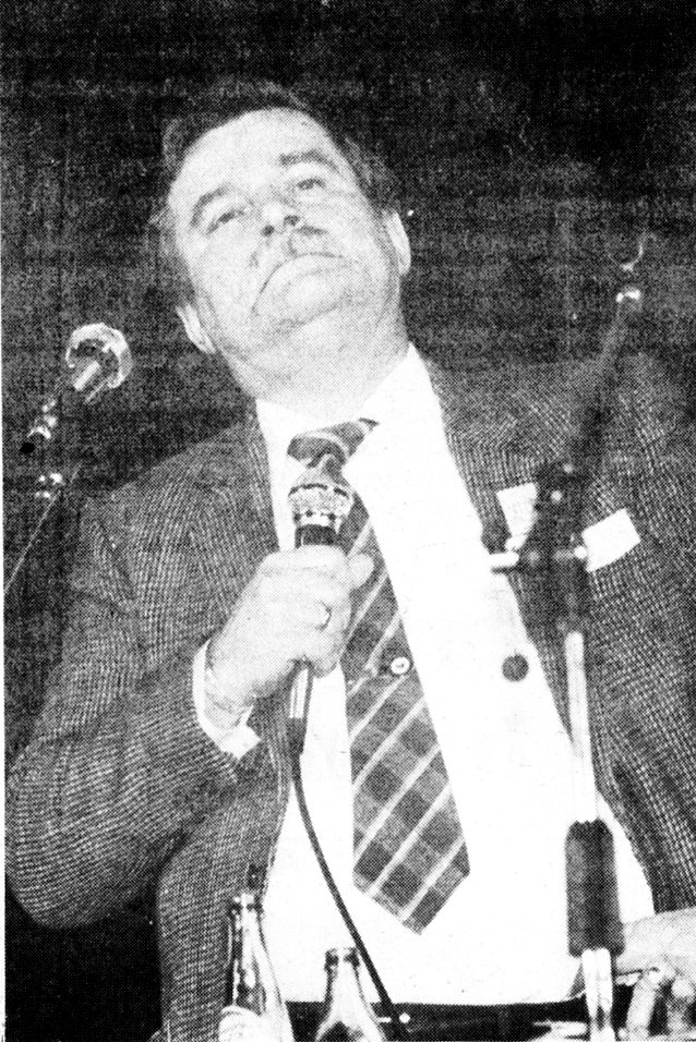 Lech Wałęsa na wiecu we Wrocławiu, wrzesień 1990